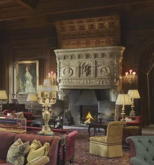 Camino della sala grande nel Palazzo di Cliveden